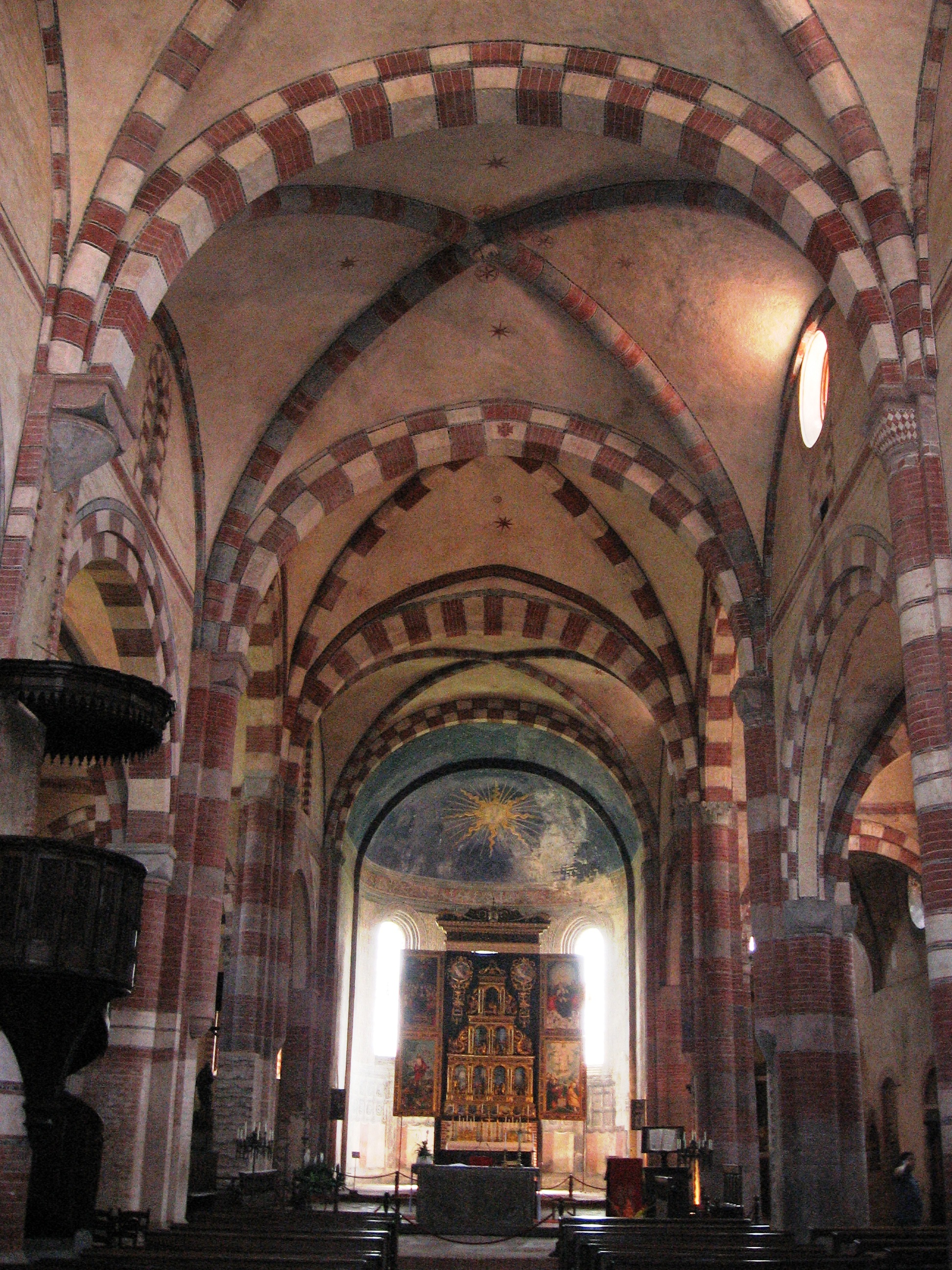 Revello. Cuneo. Abbazia cistercense di Staffarda. Navata centrale della Chiesa Abbaziale.